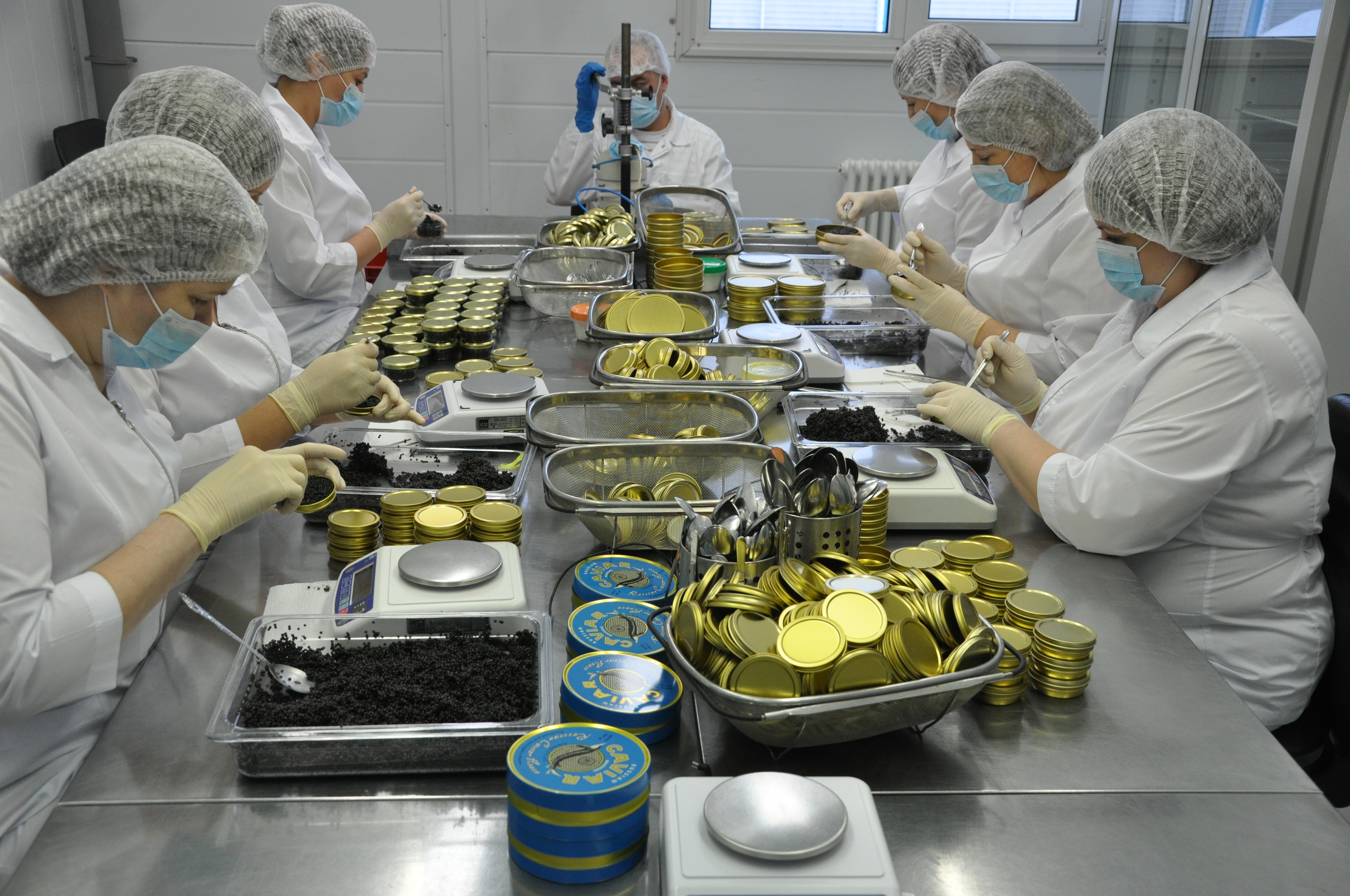 Фасовочный цех компании "Русский икорный дом"